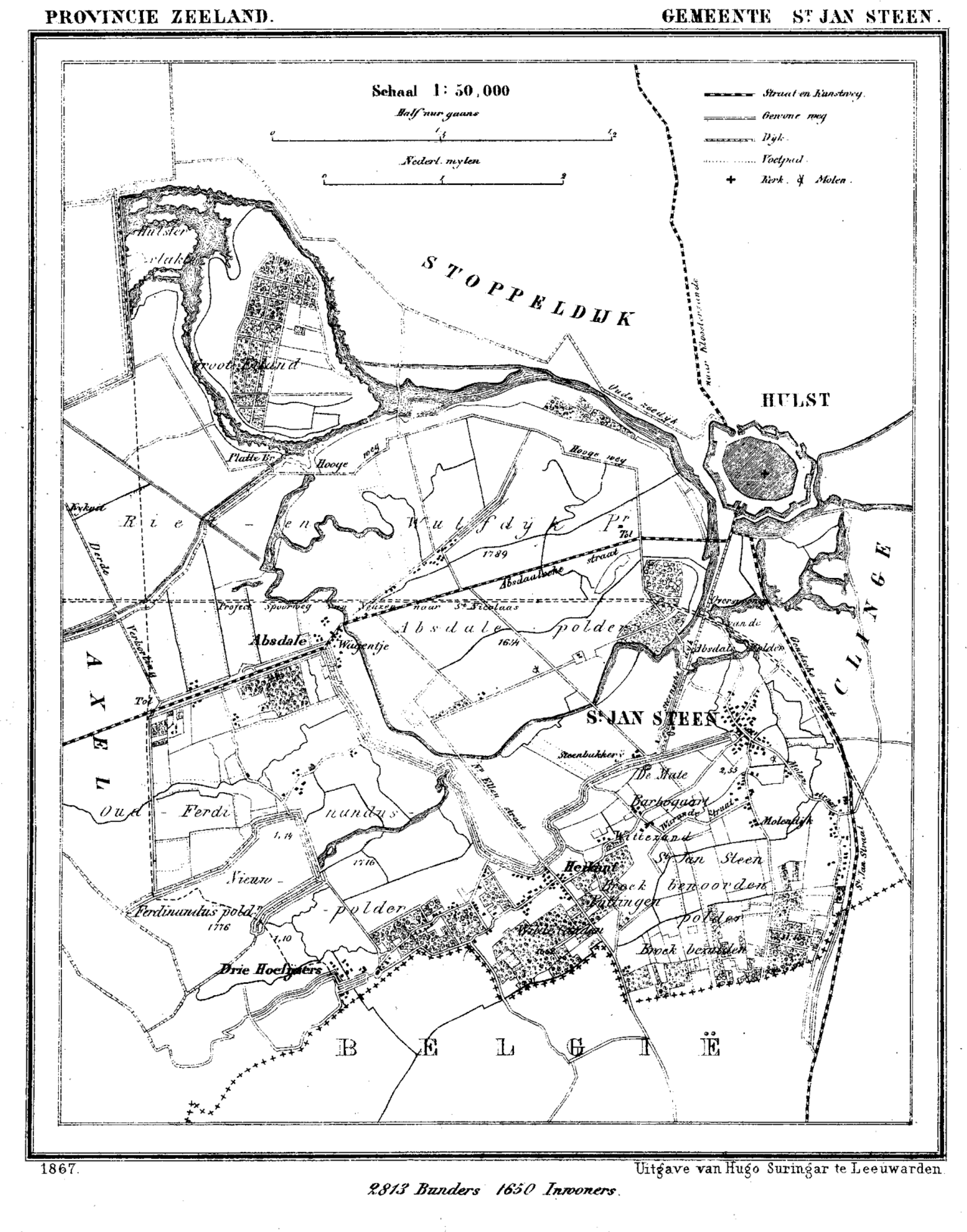 Gemeente Sint Jansteen, Zeeland, Nederland